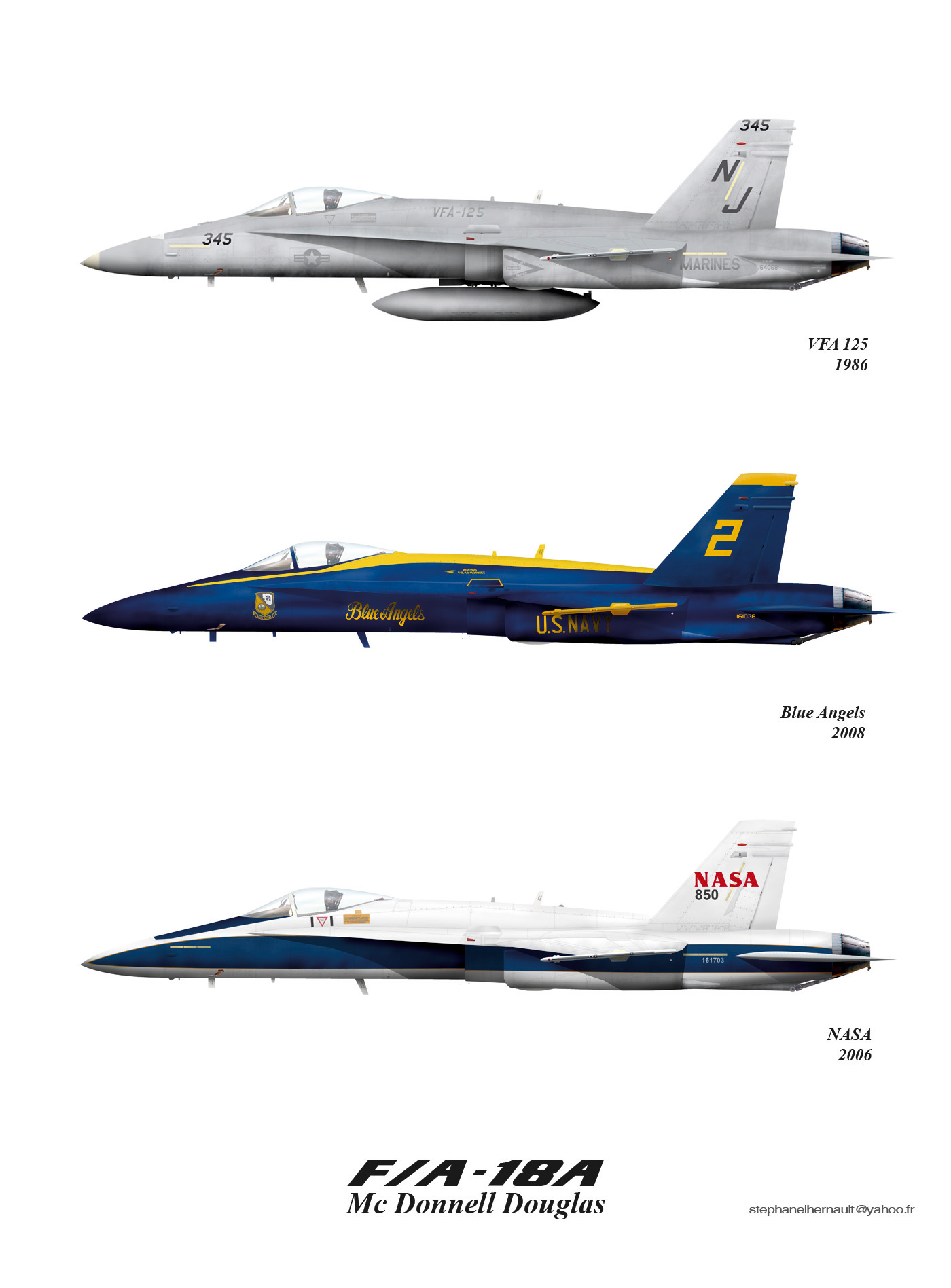 F/A 18A Mc Donnell Douglas version A